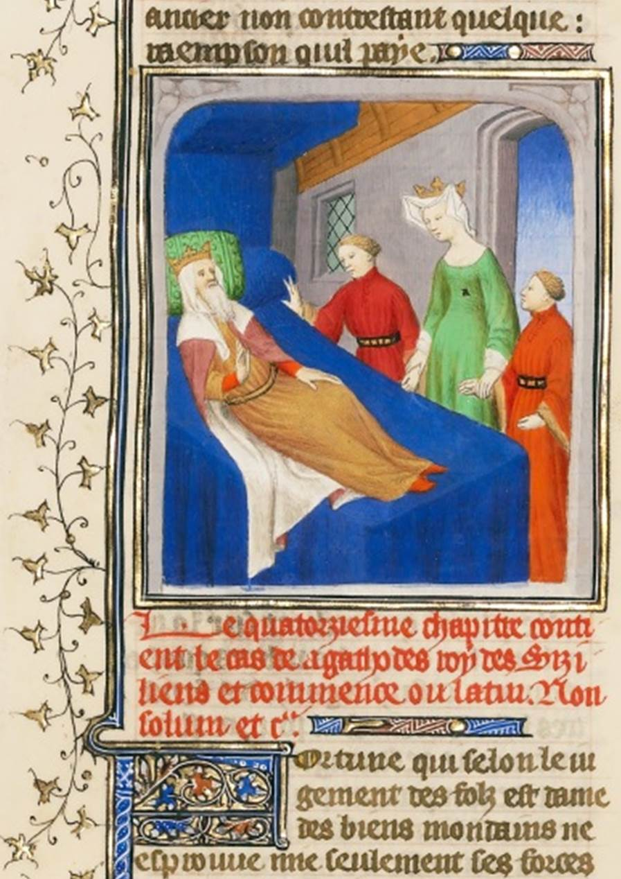 Ritaglio da immagine già presente su Commons.